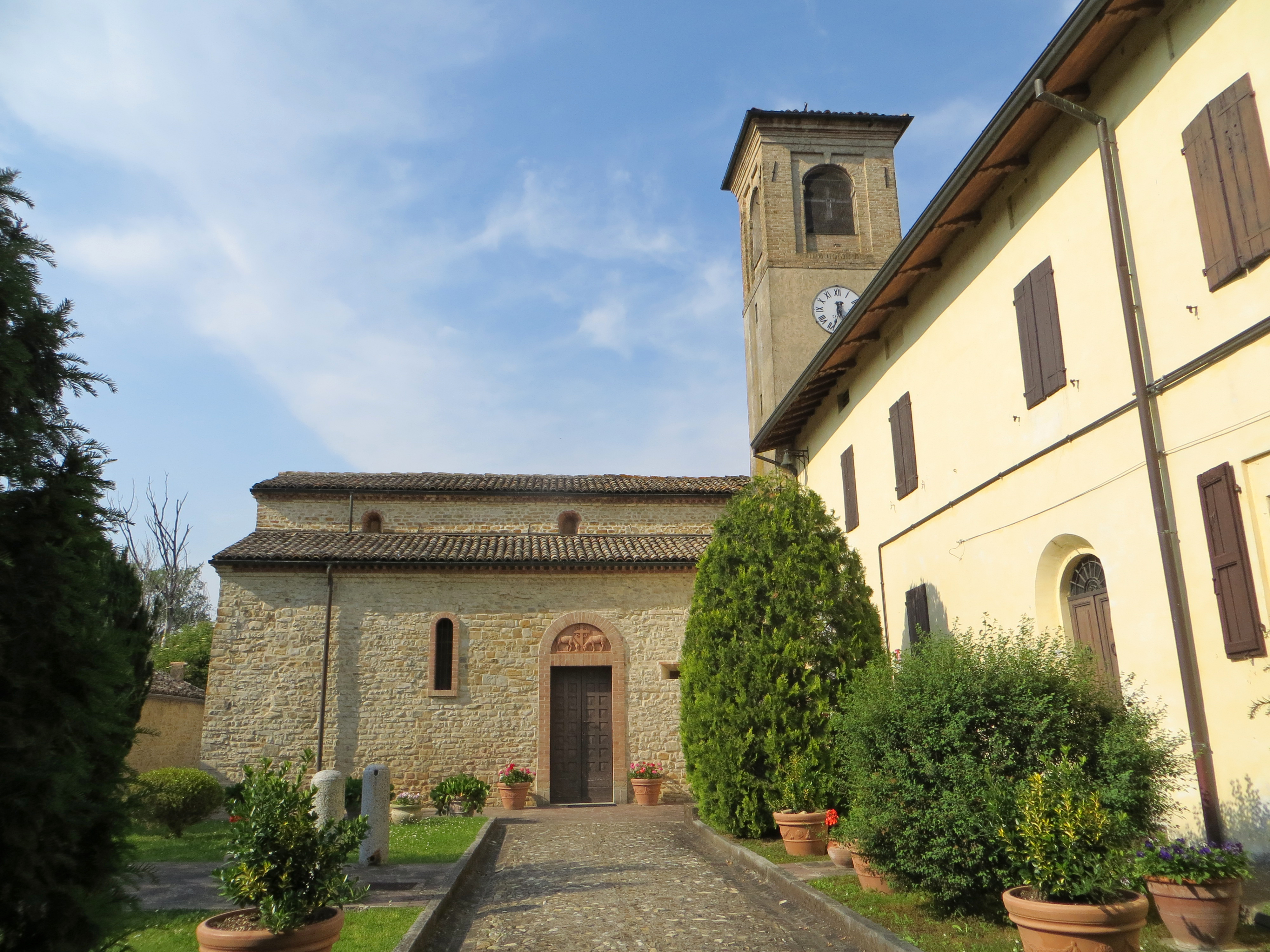 Pieve dei Santi Ippolito e Cassiano (Gaione, Parma) - lato sud